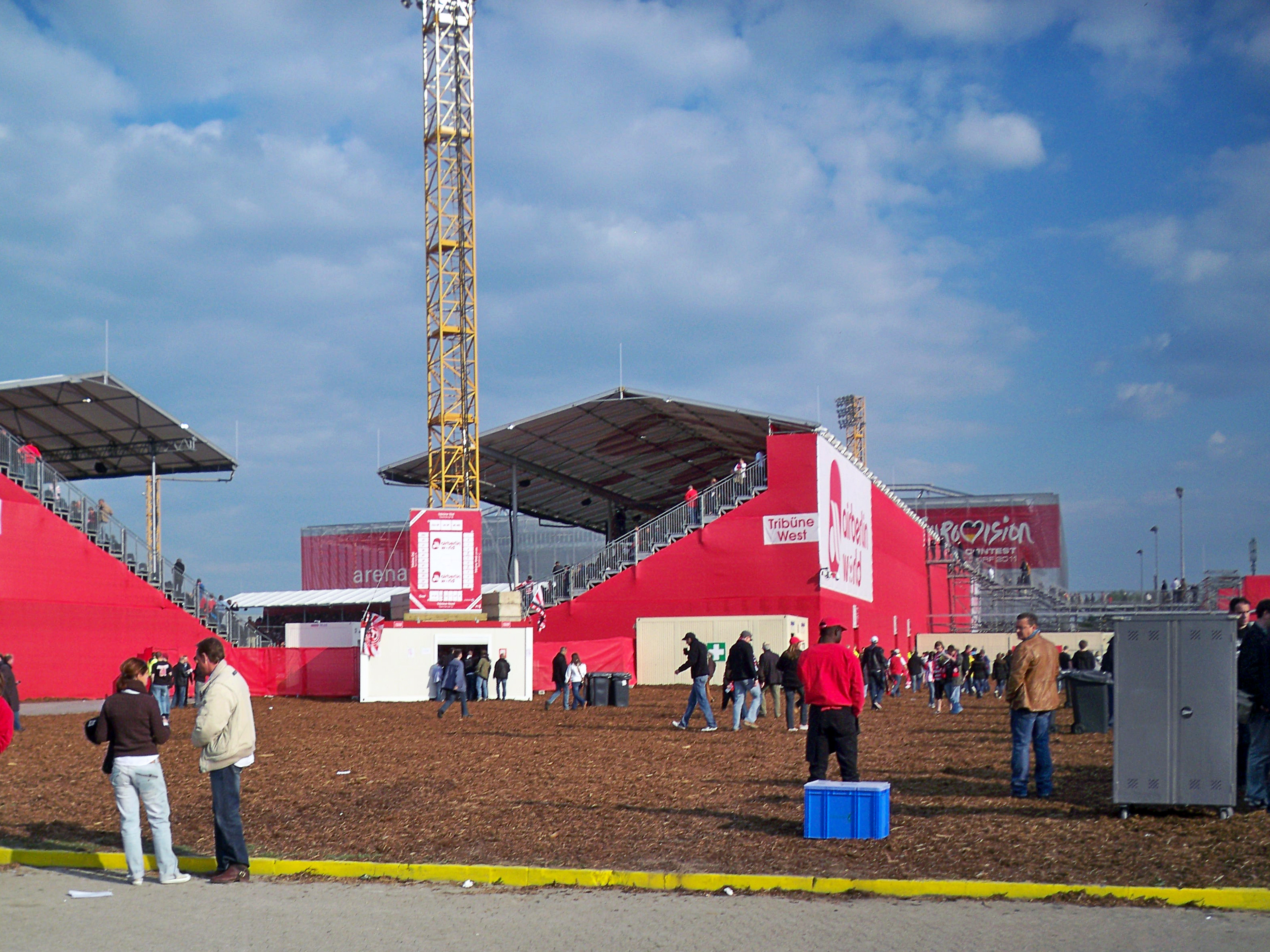 Das Ausweichstadion Airberlin World in Düsseldorf.